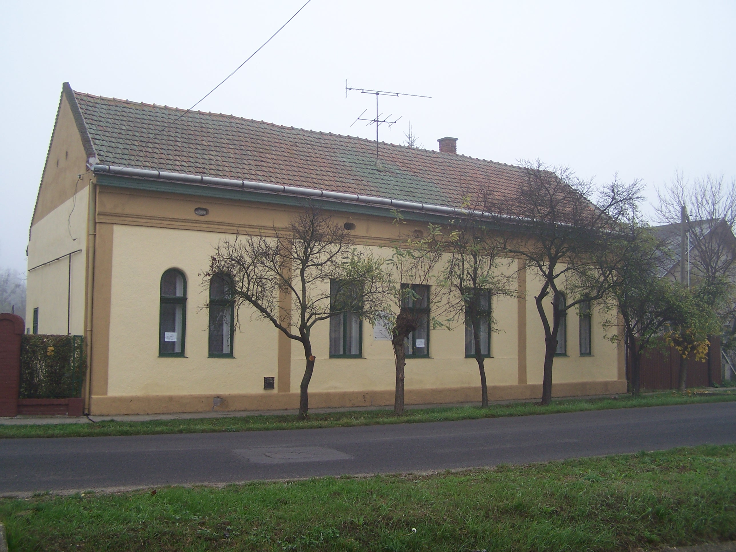 Maghy Zoltán szülőháza Hajdúnánáson, a Jókai utcában (wikipedia)